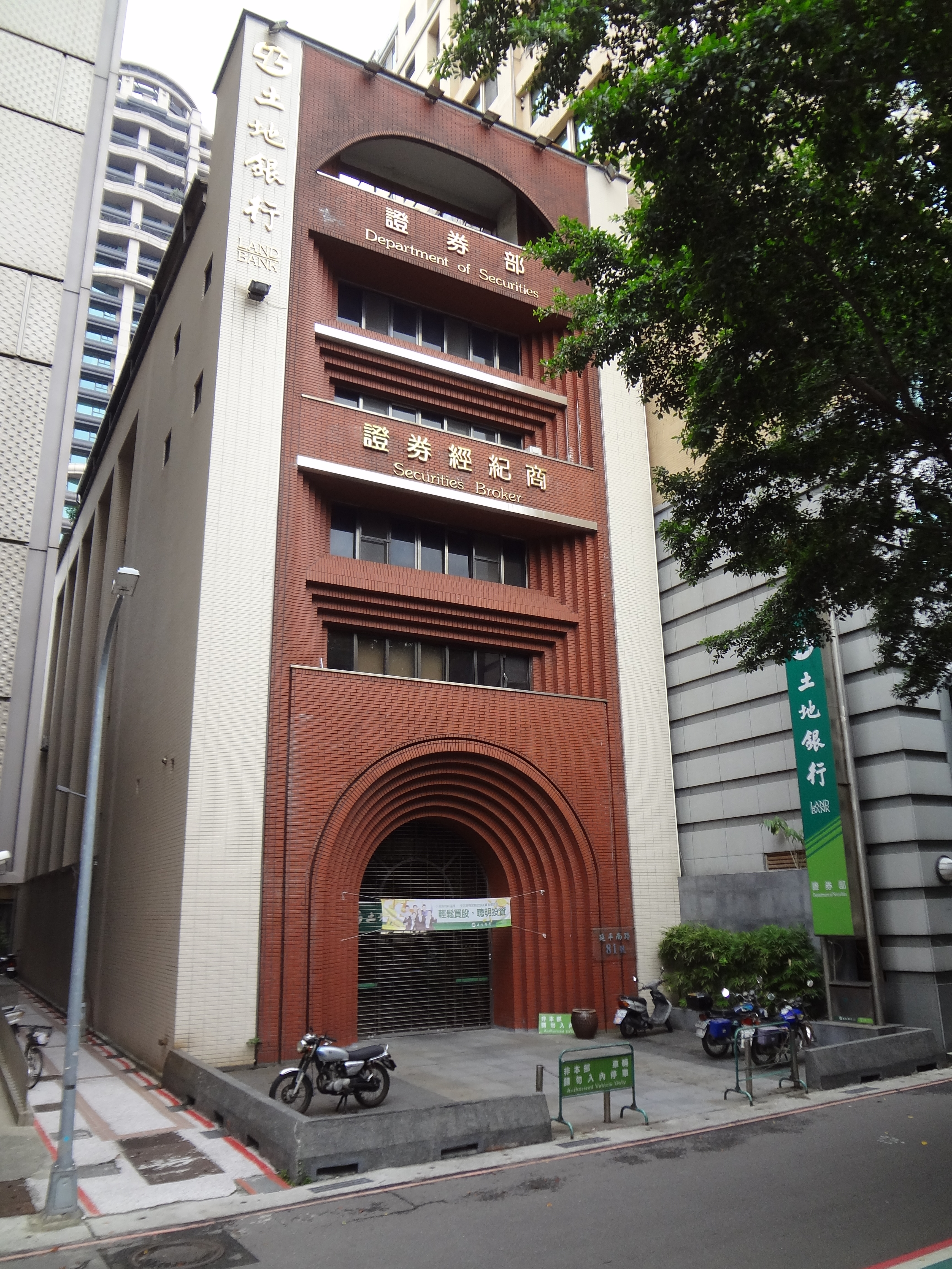 臺灣土地銀行延平大樓，位於臺北市中正區延平南路81號，為臺灣土地銀行證券部所在地。